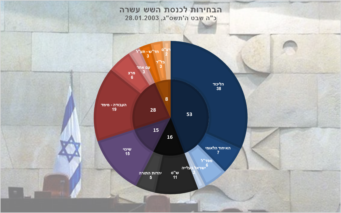 תוצאות הבחירות לכנסת השש עשרה